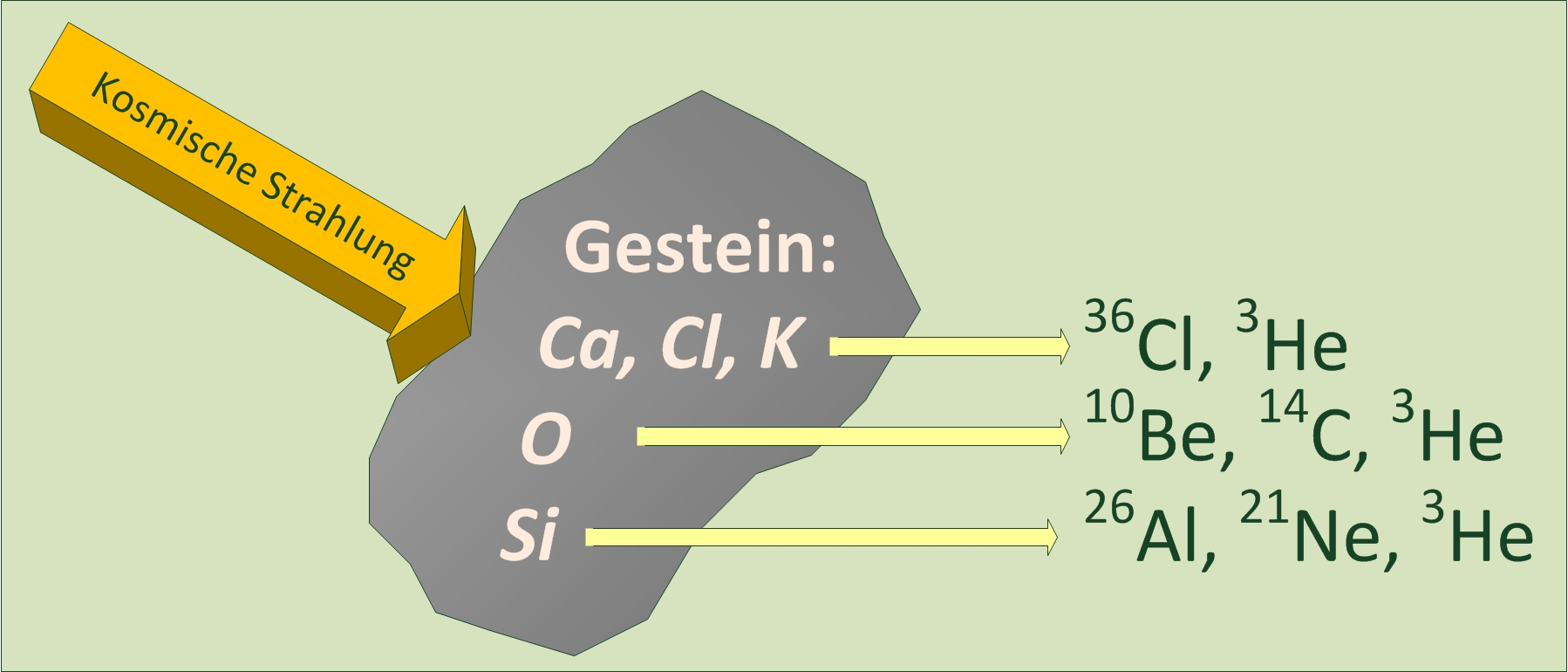 Generation of radionuclides by cosmic rays at the surface of rocks